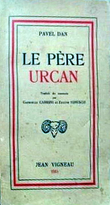 Coperta cărţii "Le Père Urcan" (traducerea in limba franceză a cărţii "Urcan Bătrânul" de Pavel Dan, Marsilia, 1945).